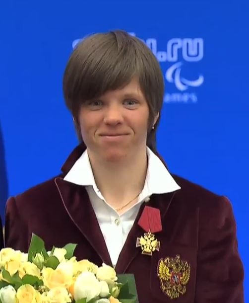 Трёхкратная паралимпийская чемпионка и серебряный призёр Паралимпийских игр в лыжных гонках Елена Ремизова.